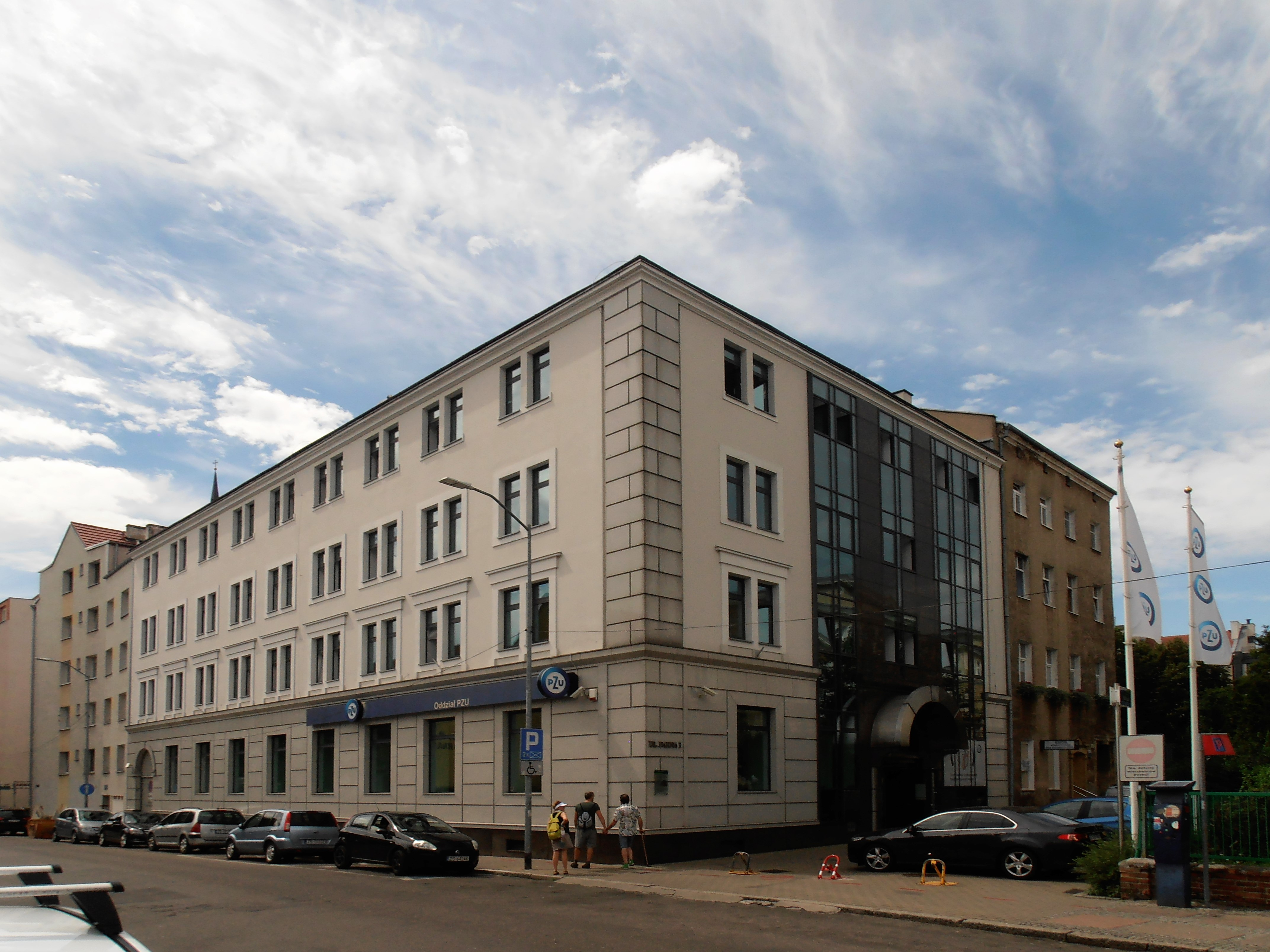 Ulica Farna w Szczecinie, 2018 r. W budynku narożnym w 1729 r. urodziła się Zofia Fryderyka Augusta von Anhalt Zerbst, późniejsza caryca Katarzyna II Wielka.